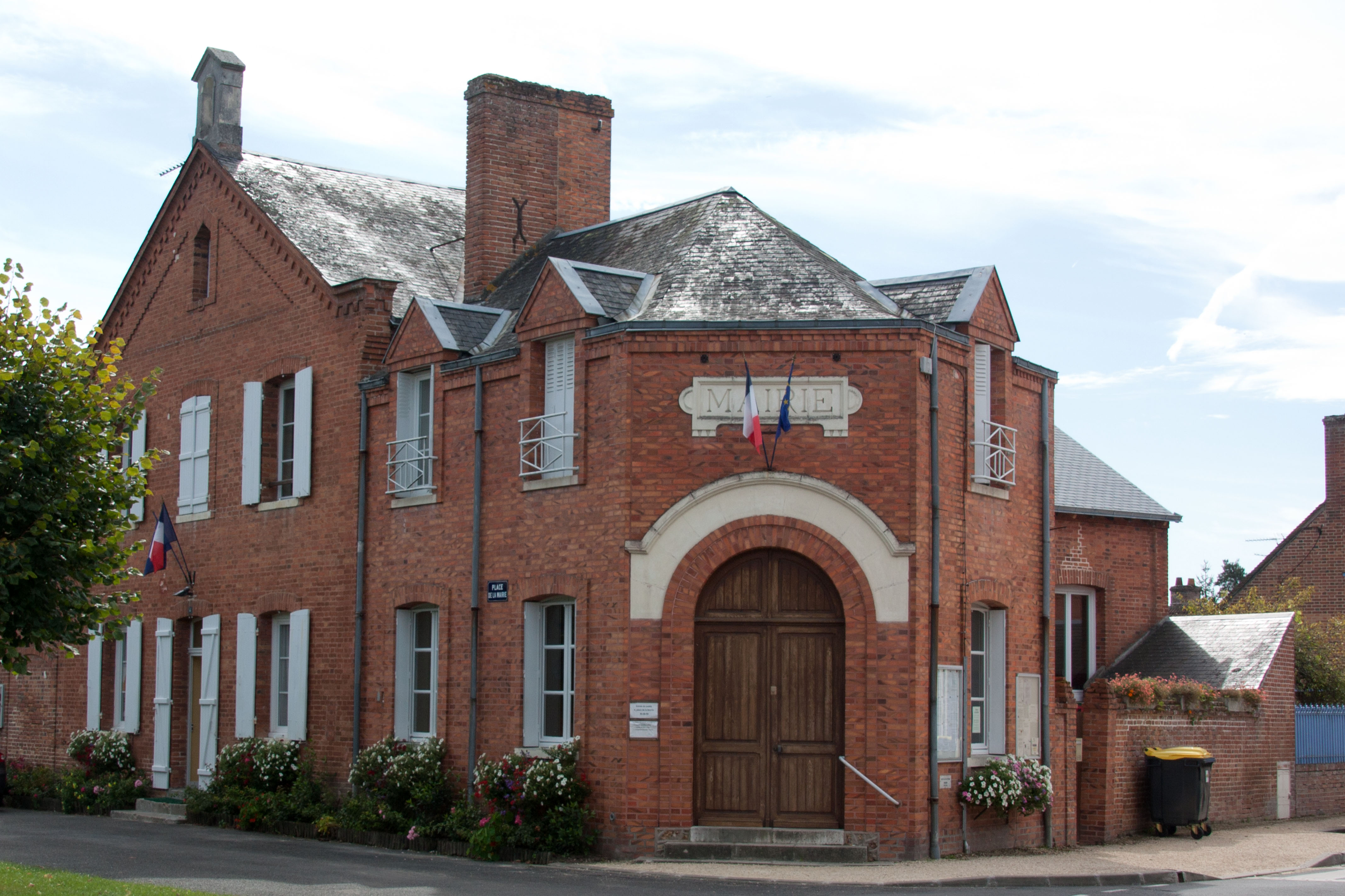 Mairie de Chaon, Loir-et-Cher, France